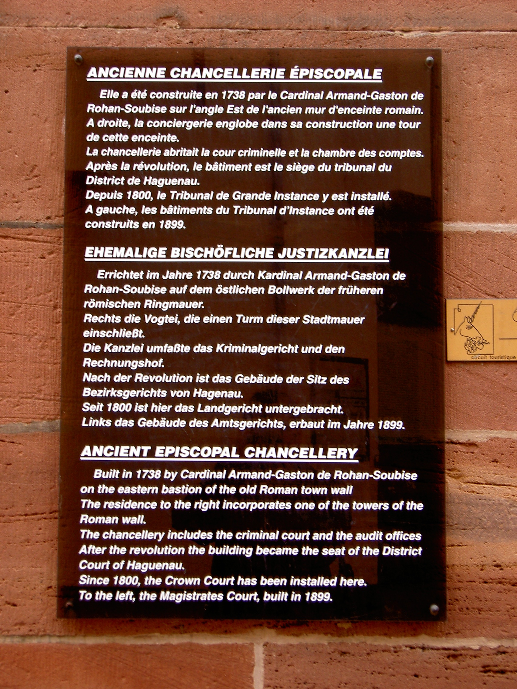 Détail du TGI de Saverne